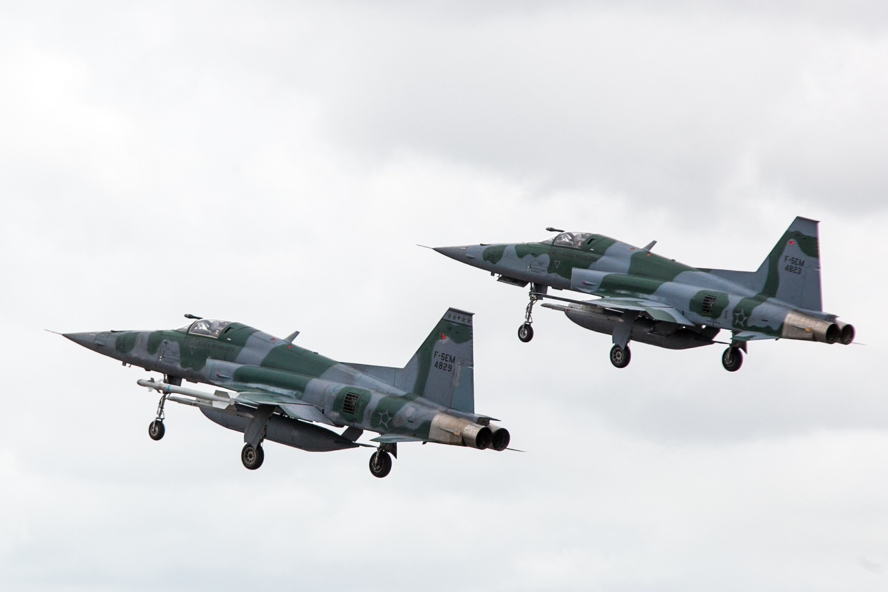 Fotos Felipe Barra/MD